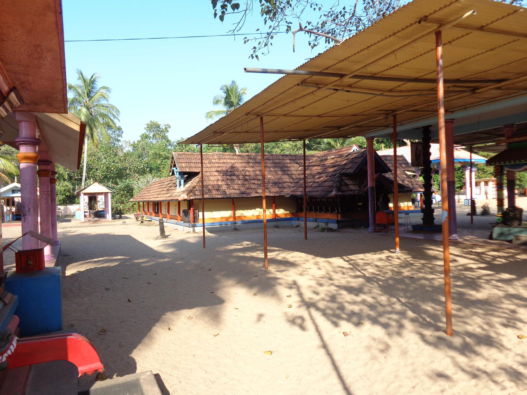 kattanam bharanikavu bhadrakali temple